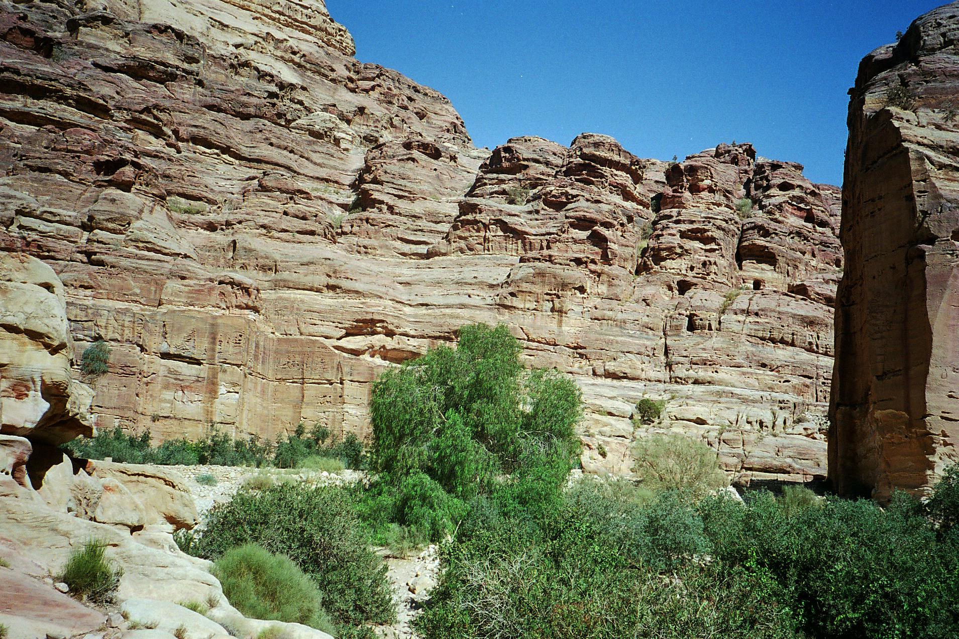 Wadi Siyagh in Petra, Jordan, next to the main quarry Le Wadi Siyagh à Pétra (Jordanie) à proximité de la carrière